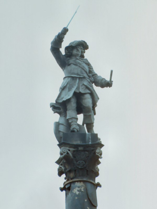 Statue auf der Preußensäule von 1854 bei Neukamp auf der Insel Rügen im Juli 1989